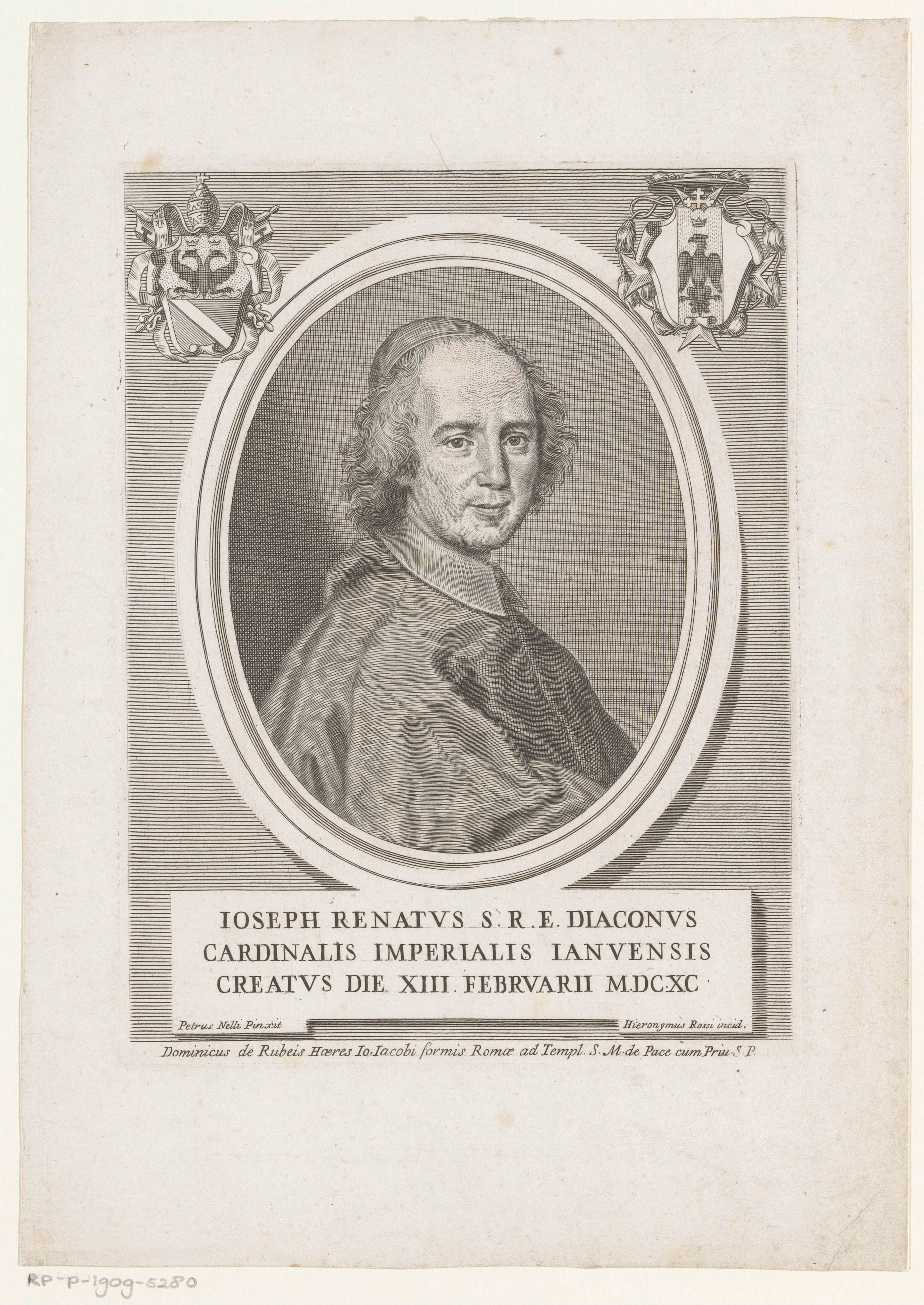 IdentificatieTitel(s): Portret van kardinaal Giuseppe Renato ImperialiObjecttype: prent Objectnummer: RP-P-1909-5280Opschriften / Merken: verzamelaarsmerk, verso, gestempeld: Lugt 2228VervaardigingVervaardiger: prentmaker: Girolamo Rossi (II) (vermeld op object)naar schilderij van: Pietro Nelli (vermeld op object)uitgever: Domenico de'Rossi (vermeld op object)verlener van privilege: Pauselijk hof (vermeld op object)Plaats vervaardiging: prentmaker: Romenaar schilderij van: Italiëuitgever: Romeverlener van privilege: VaticaanstadDatering: 1690 - 1762Fysieke kenmerken: gravureMateriaal: papier Techniek: graveren (drukprocedé)Afmetingen: plaatrand: h 214 mm × b 163 mmOnderwerpWat: historical personscardinalWie: Giuseppe Renato ImperialiVerwerving en rechtenVerwerving: aankoop 1905Copyright: Publiek domein